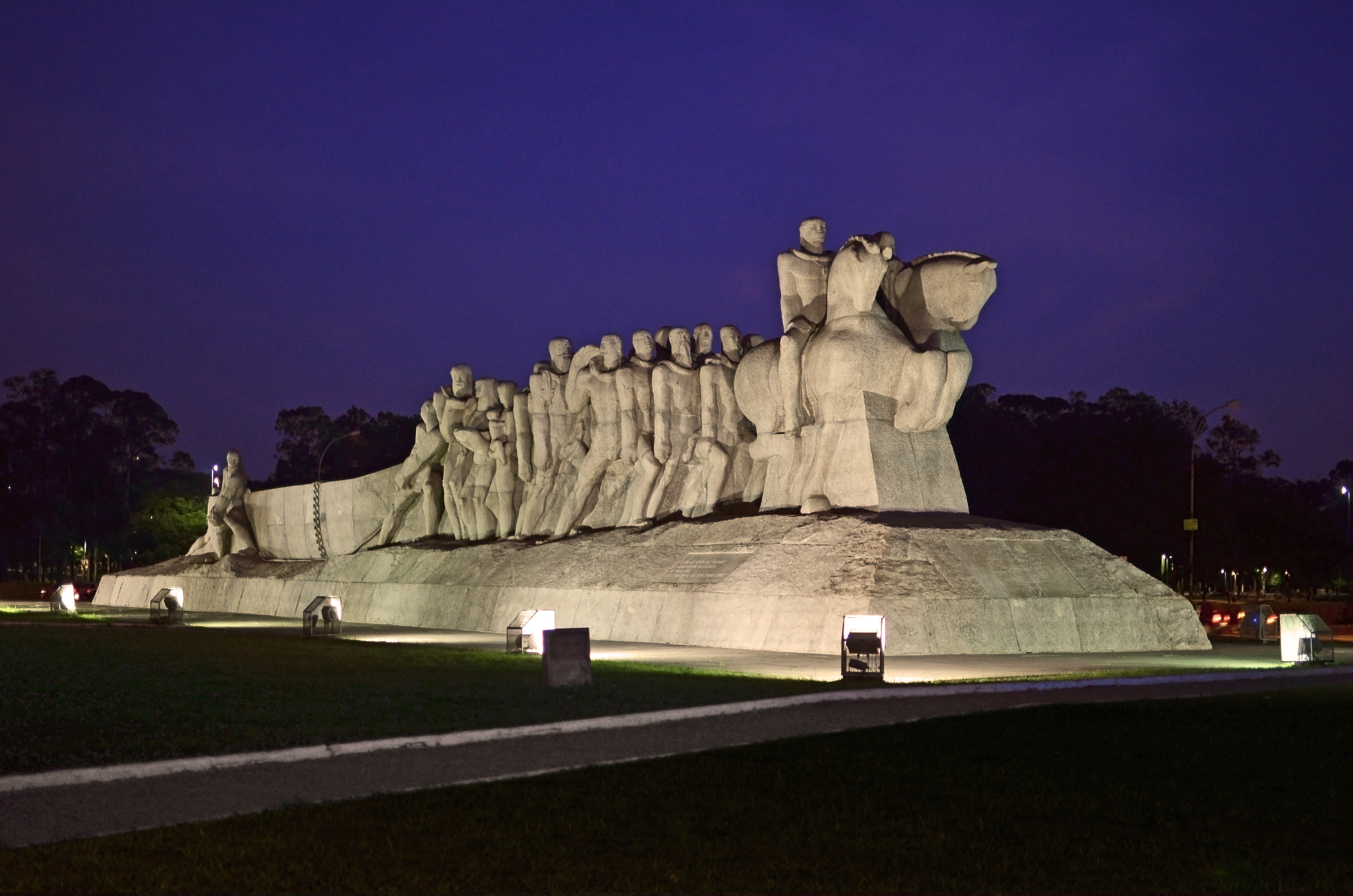 Monumento às Bandeiras - Ibirapuera - escultura de Victor Brecheret